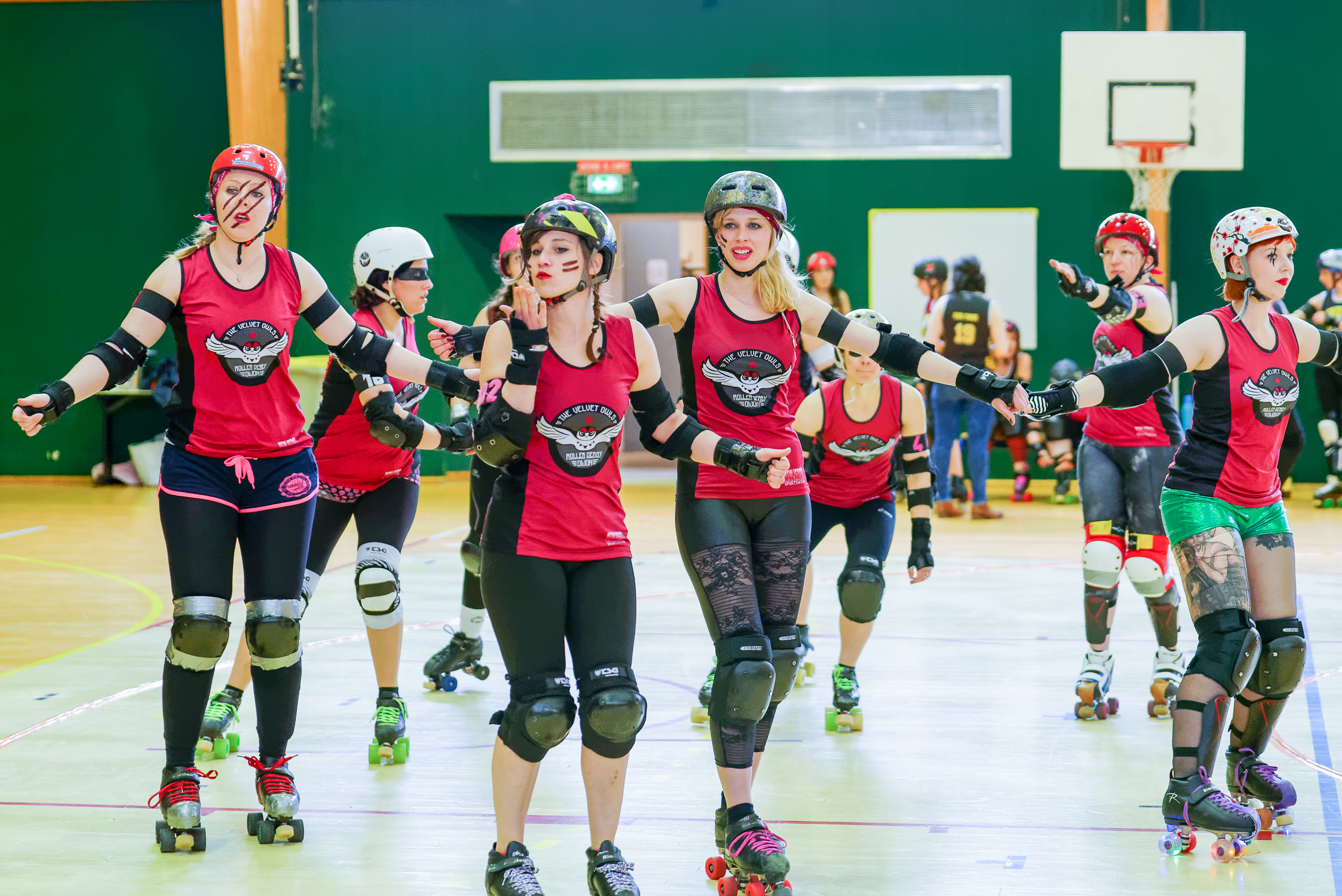 Championnat de France Roller Derby Nationale 2 Zone 5 Plateau 5. Rencontre The Velvet Owls - Roller Derby Dijon - Knee Breakers On Wheels /Roller Derby Belfort au gymnase Jean-Marc Boivin (Dijon, Côte d'Or, Bourgogne-Franche Comté, France).